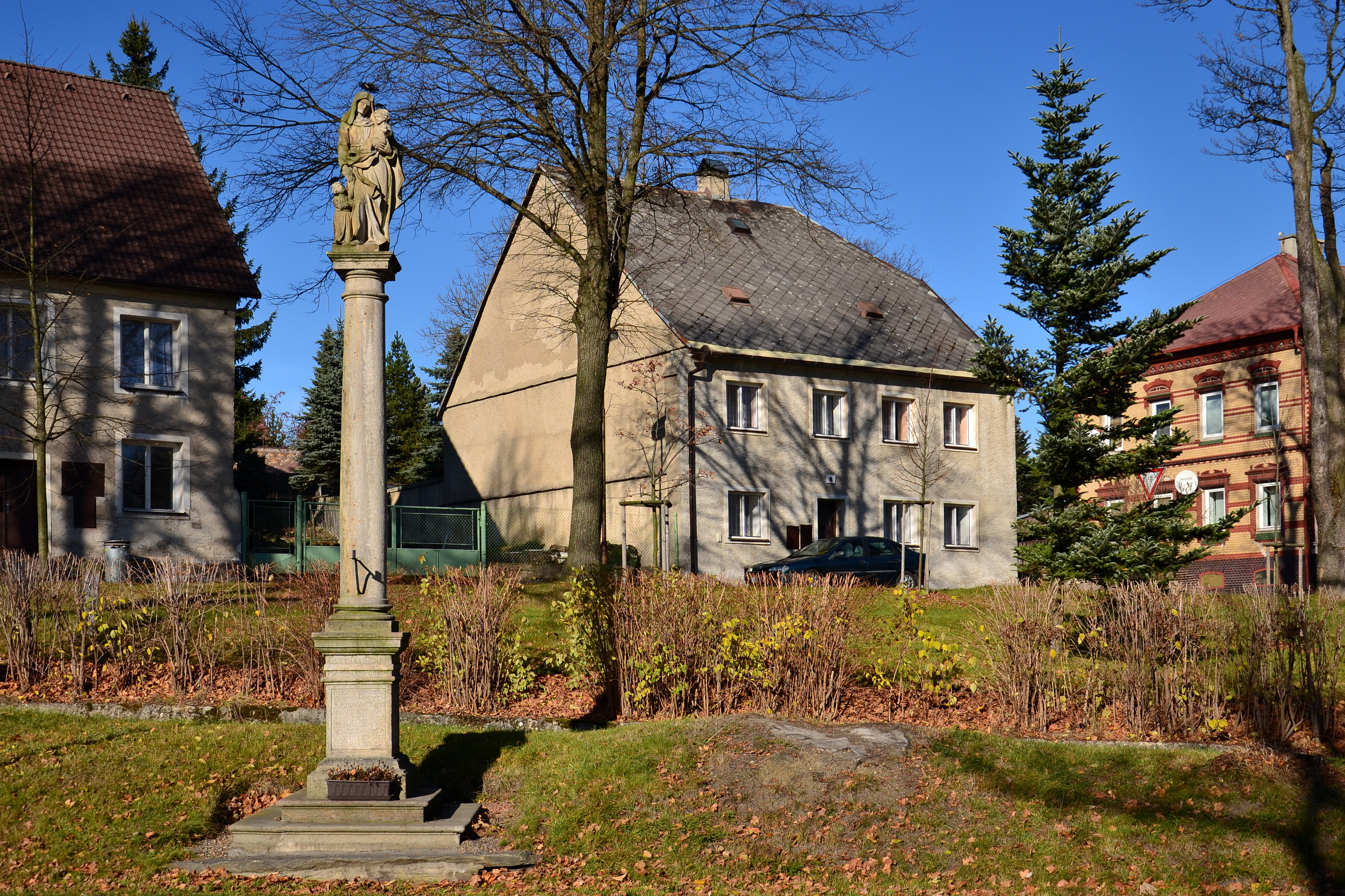 Sloup se sochou svaté Anny Samétřetí, Výsluní.